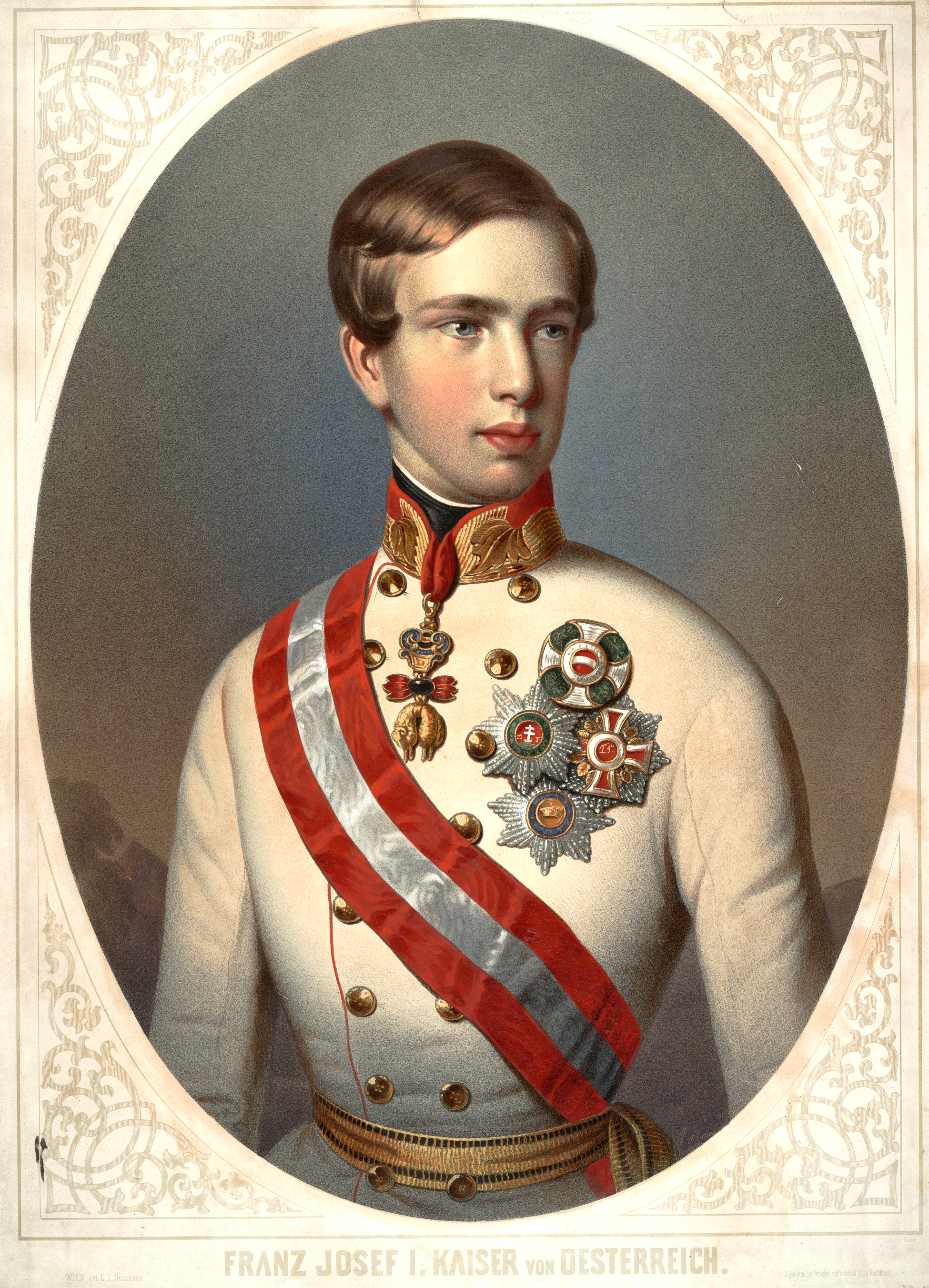 I. Ferenc József[1] (németül: Franz Joseph von Österreich; csehül František Josef; lengyelül: Franciszek Józef; horvátul Franjo Josip; szlovénül Franc Jožef; szlovákul: František Jozef; olaszul: Francesco Giuseppe; románul: Francisc Iosif; szerbül: Франц Јозеф; ukránul: Франц Йосиф; latinul Franciscus Iosephus; Bécs, 1830. augusztus 18. – Bécs, 1916. november 21.) osztrák főherceg, osztrák császár, magyar király.